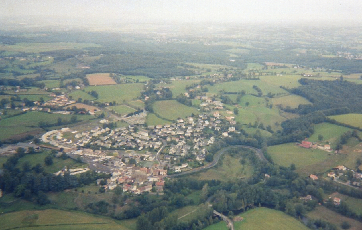 Vue aérienne de Sansac-de-Marmiesse